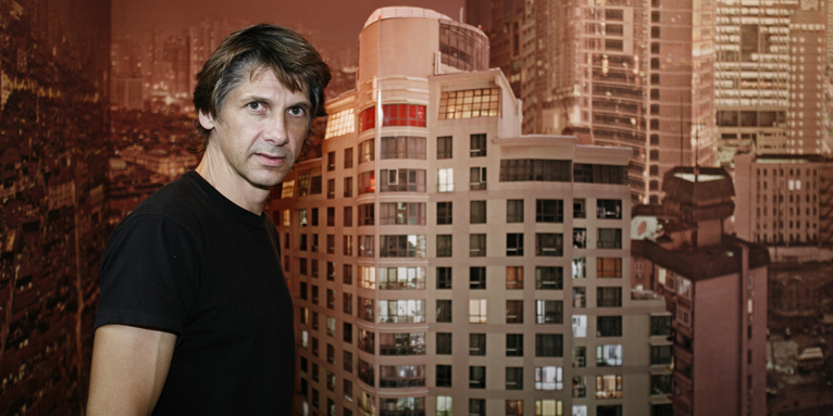 Porträtfoto Ansgar Maria van Treeck